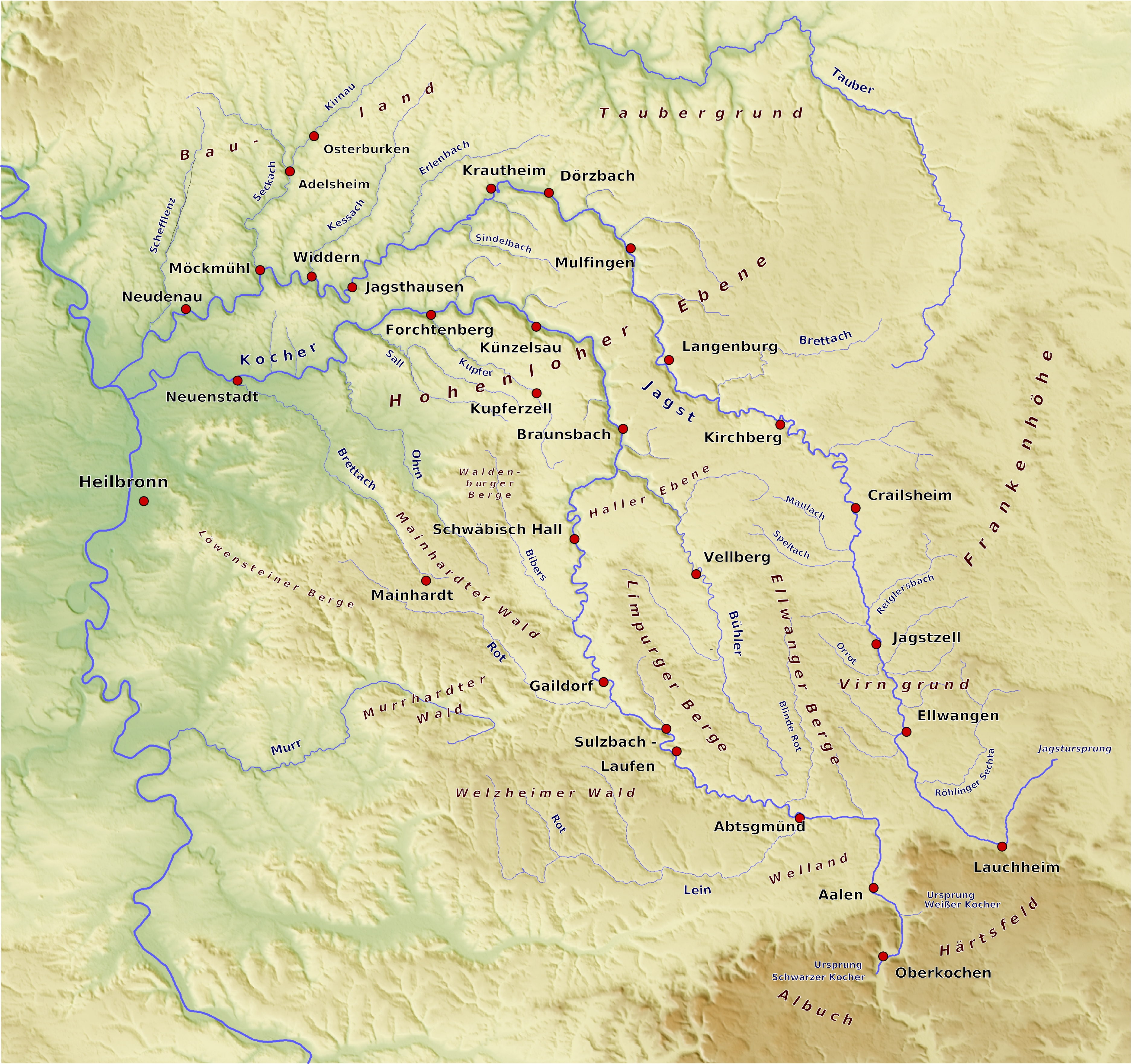 Karte Kocher und Jagst, Version 3